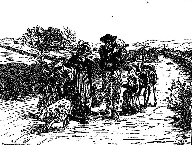 Dessin: Gens de Plounéour-Ménez se rendant à la foire""